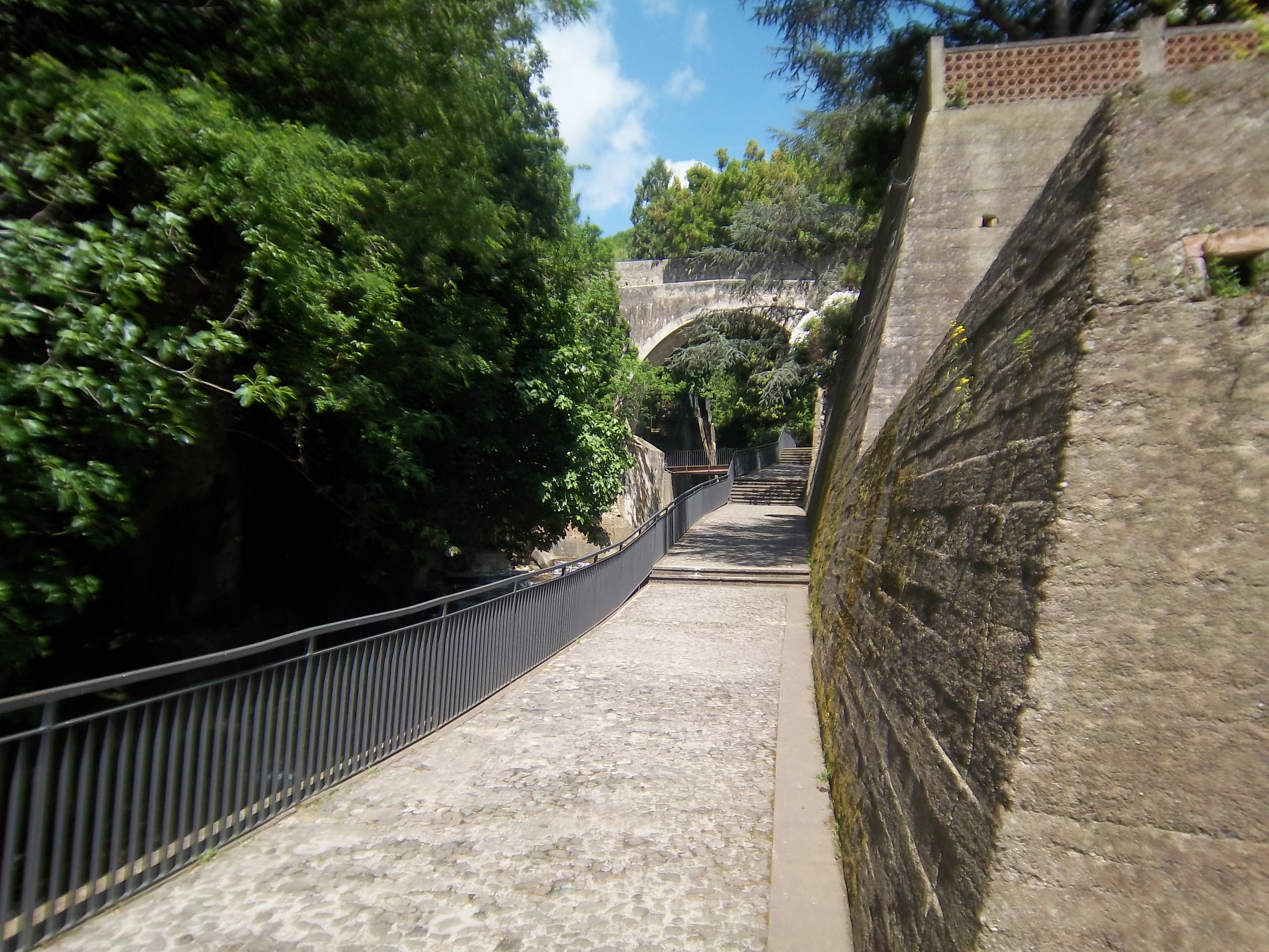 Foto Santuario San Francesco di Paola ( Maggio 2013).